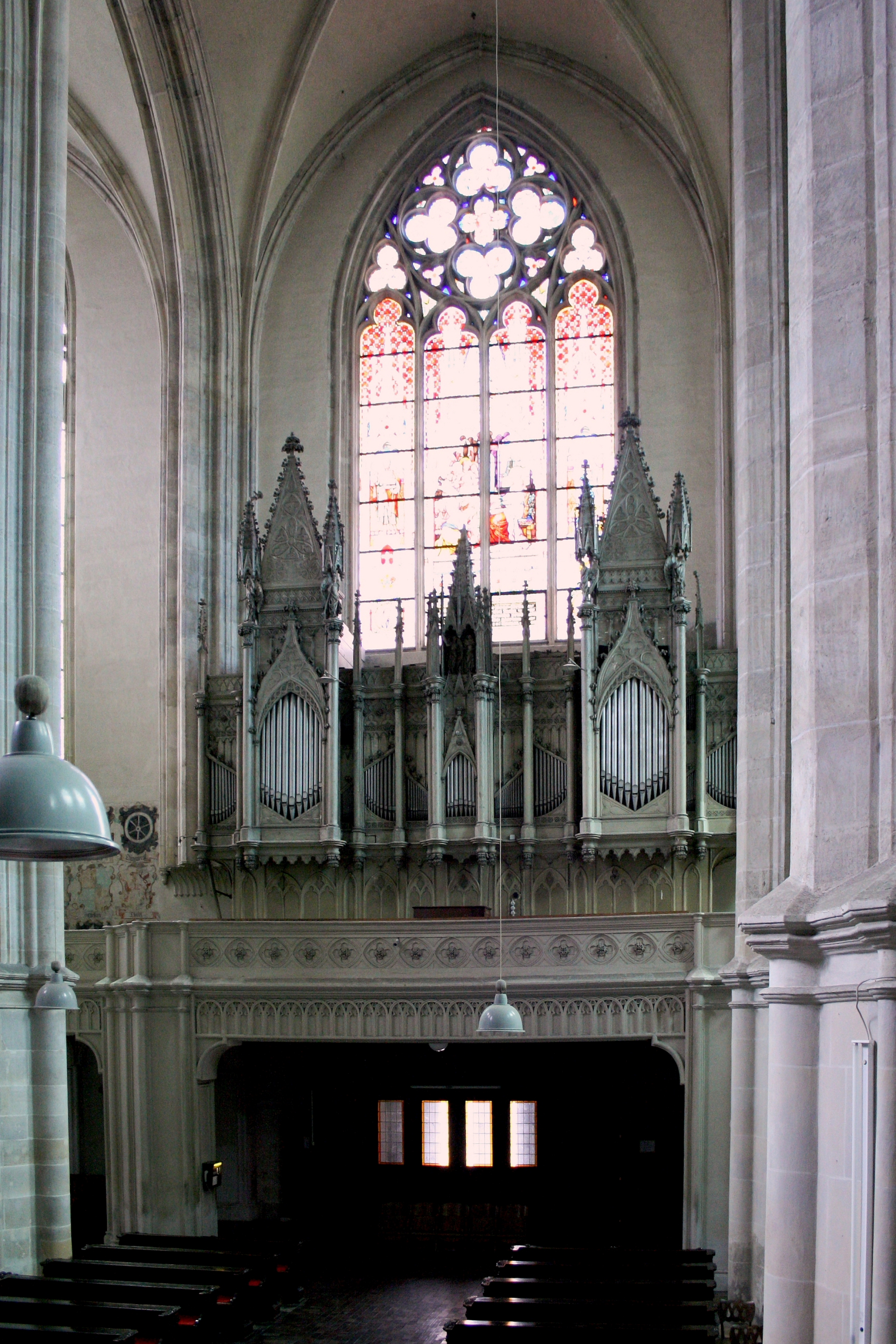 Die Orgel der Wiener Minoritenkirche am Minoritenplatz im 1. Bezirk in Wien, Österreich. Sie wurde nach Plänen von Johann Milani und Ferdinand Hetzendorf unter verwendete der Pfeifen, der Windladen und dem Spieltischgehäuse einer 1673 erbauten Vorgängerorgel von Franz Xaver Christoph 1786 gebaut.